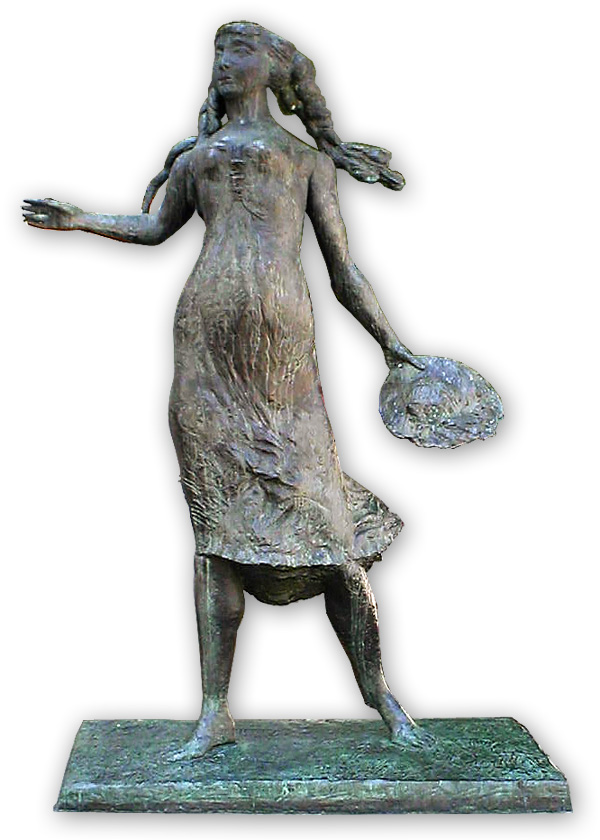 Käthchenfigur in Heilbronn. Entworfen von Dieter Läpple 1965. Die Bronzefigur war einst ein Teil des Käthchenbrunnens.